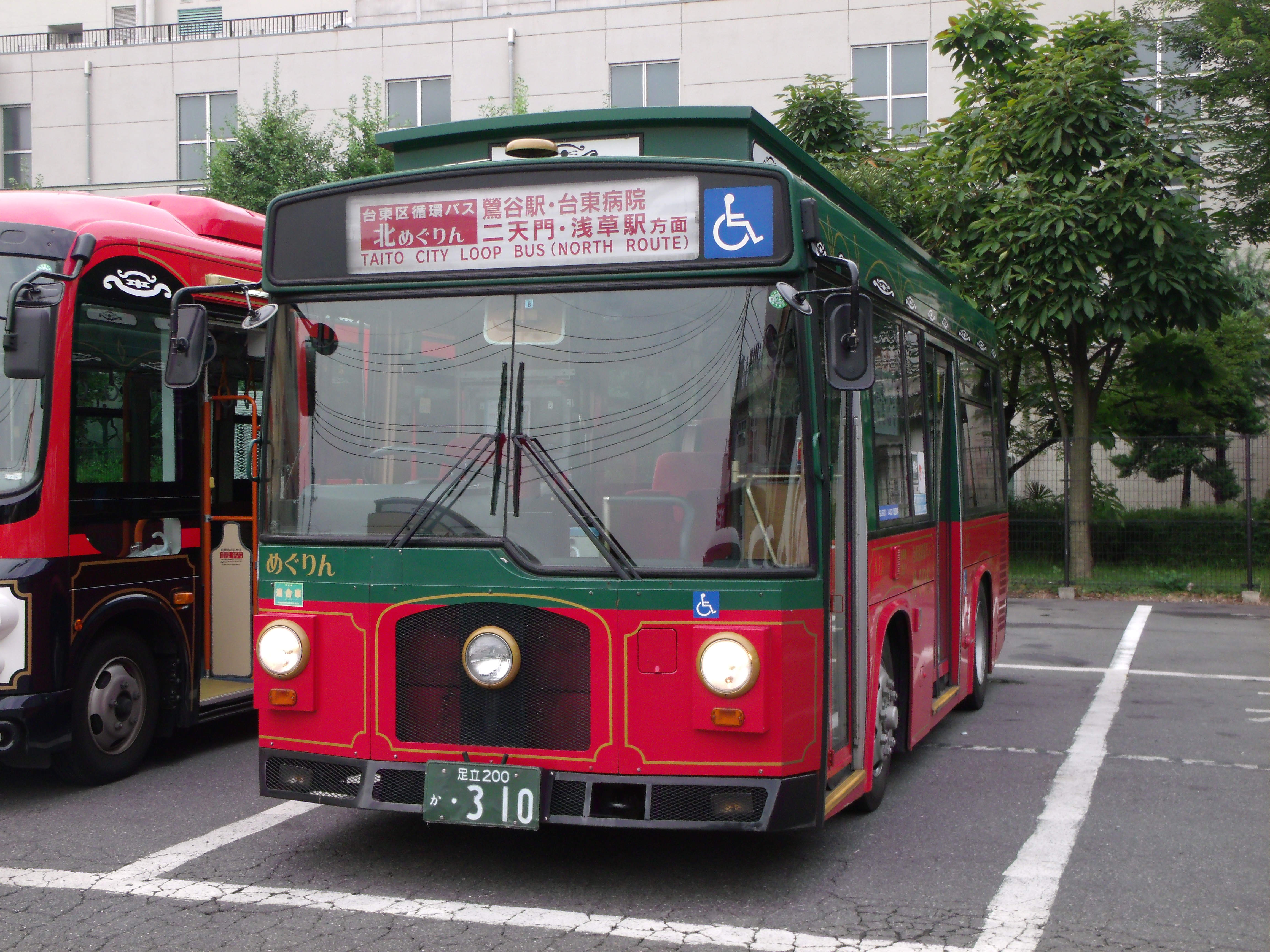 北めぐりん専用車。めぐりん開業当初（都営時代）から使用されている。